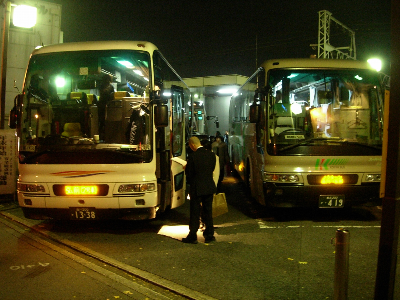 夜行高速バス「ノクターン」（京浜急行バス・弘南バス） 台数が多く、ターミナルの敷地一杯にバスが停車する